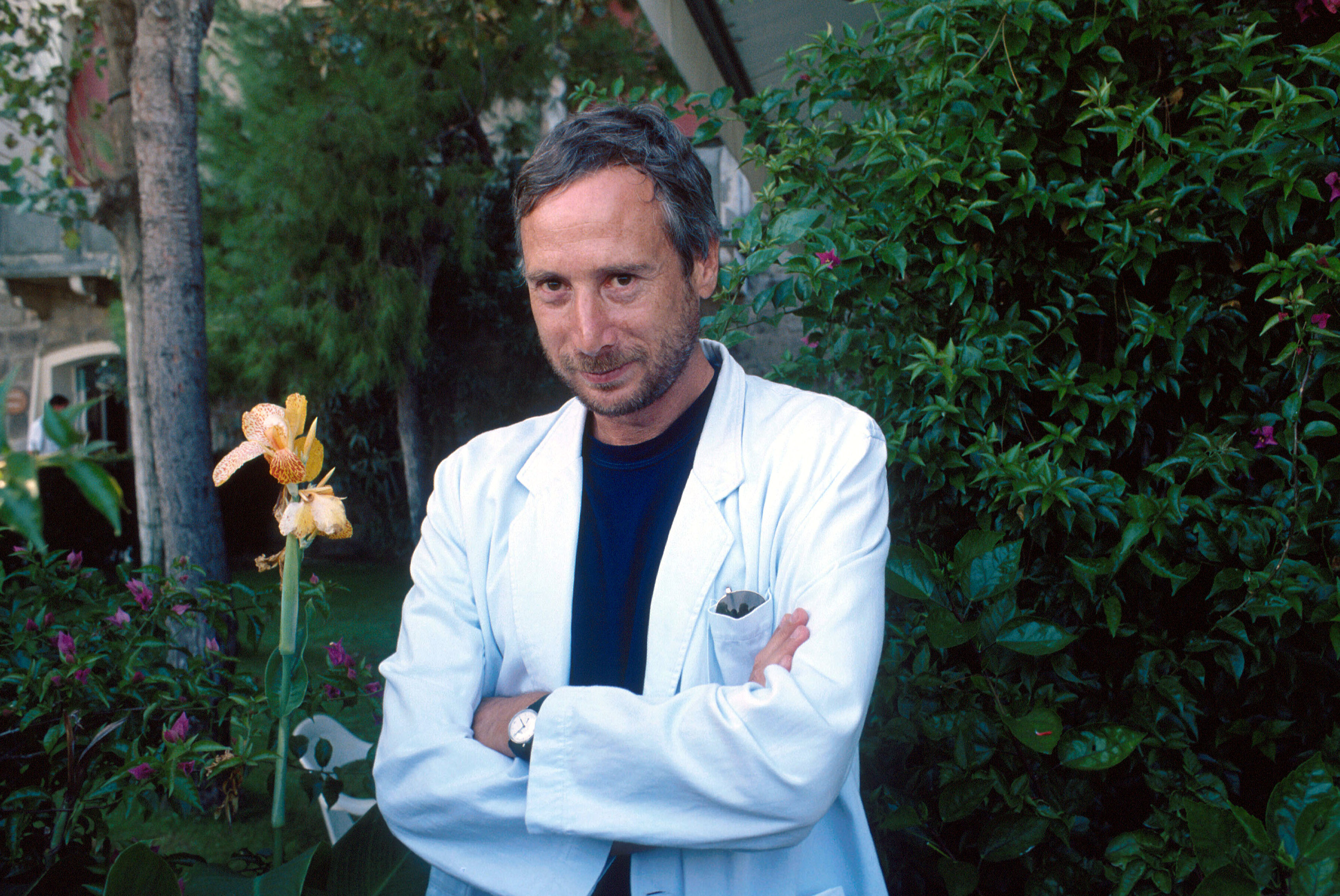 Il regista Peter del Monte alla Mostra del Cinema di Venezia del 1992